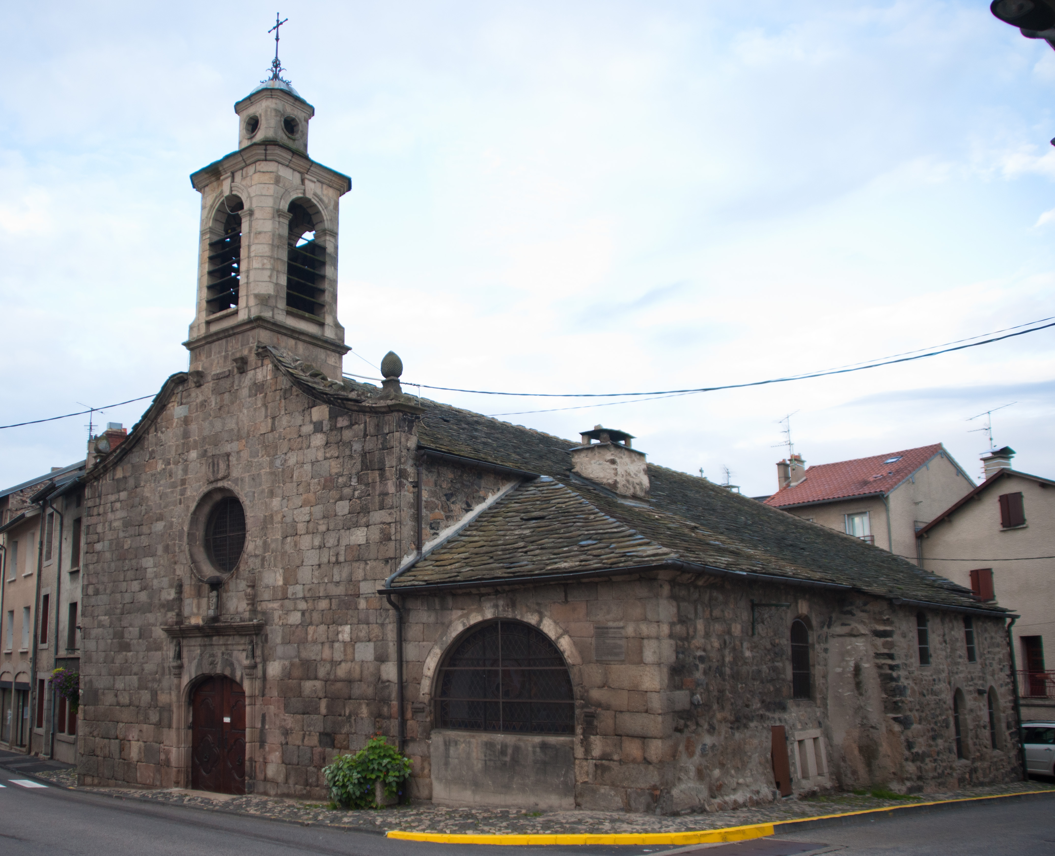 Chapelle des pénitents à Yssingeaux, Haute-Loire, France.